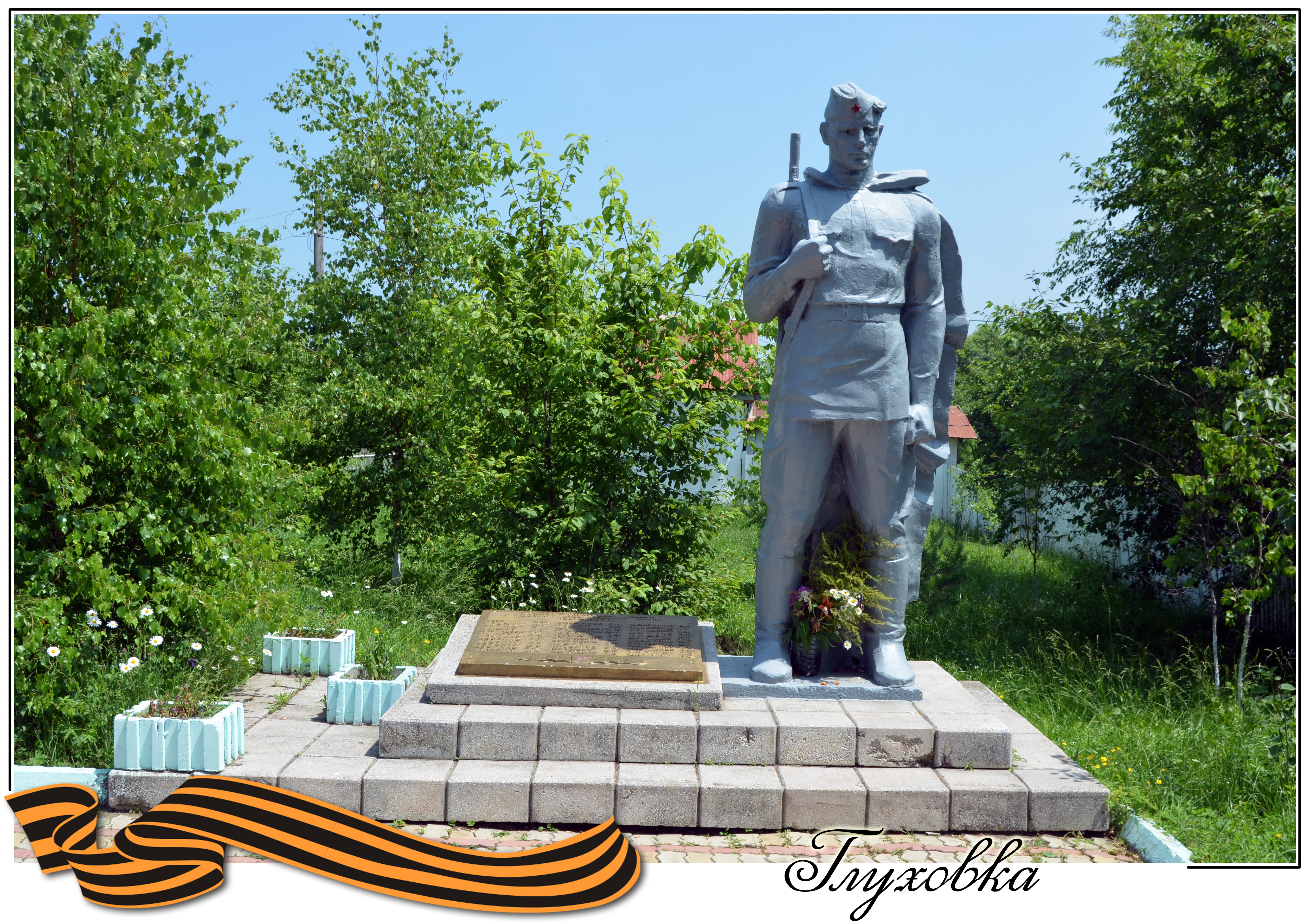 Памятник односельчанам, погибшим в годы Великой Отечественной войны 1941-1945.